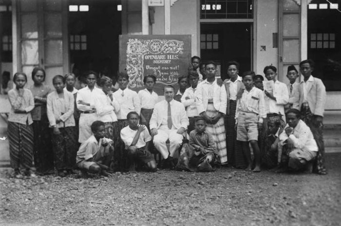 Foto. Groepsportret voor het gebouw van de openbare H.I.S. Soemenep, Madura